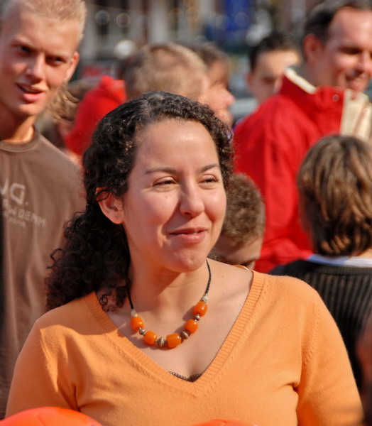 Naïma Azough, lid van de Tweede Kamer voor GroenLinks